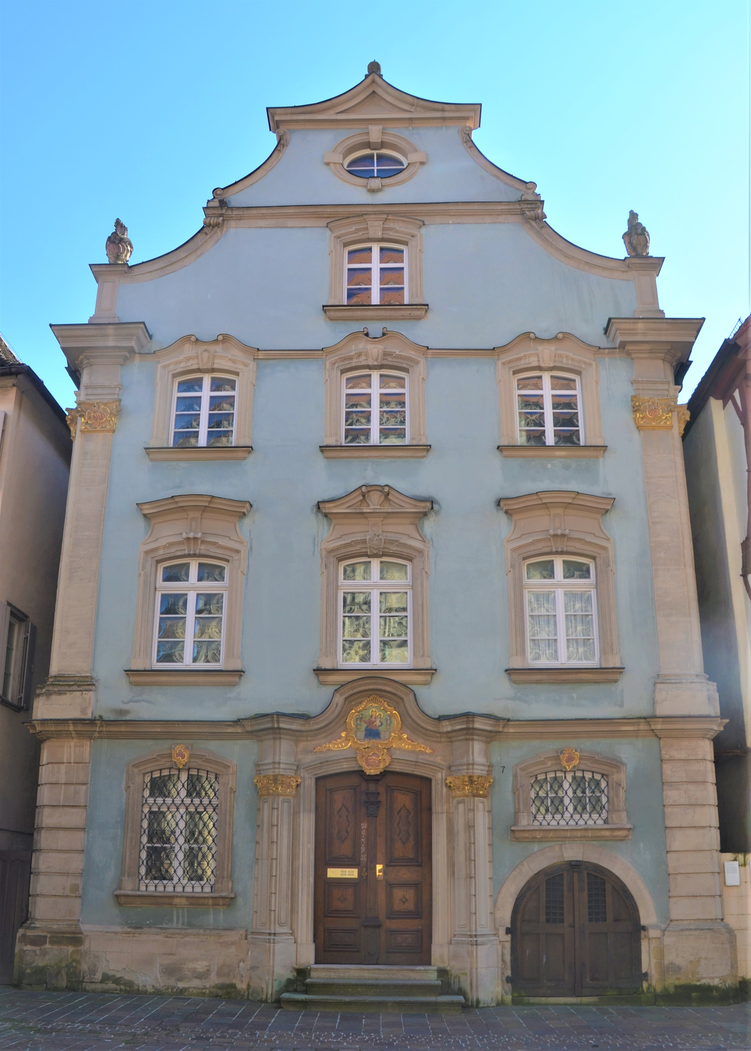 Fassade des Kaiptelshaus Schwäbisch Gmünd zumMünsterplatz hin